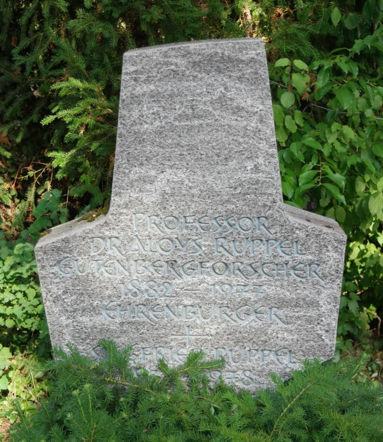 Grabstein des Bibliothekars, Archivars und Historikers Aloys Ruppel, 1882-1977, auf dem Hauptfriedhof Mainz